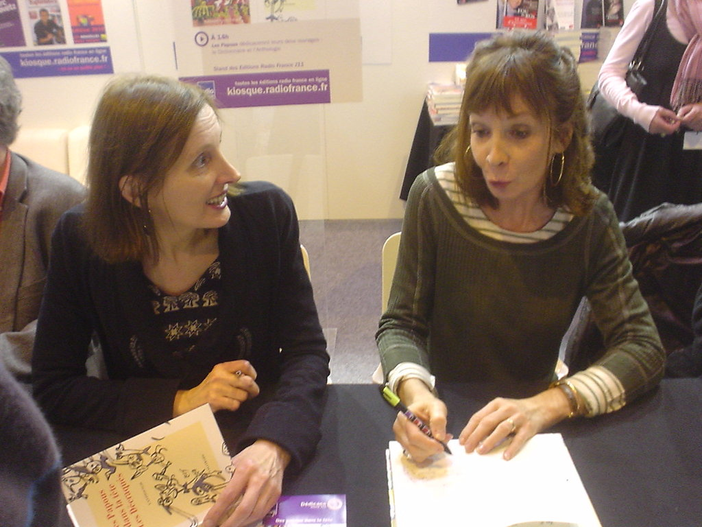 Eva Almassy et Françoise Treussard au Salon du Livre à Paris en 2010.